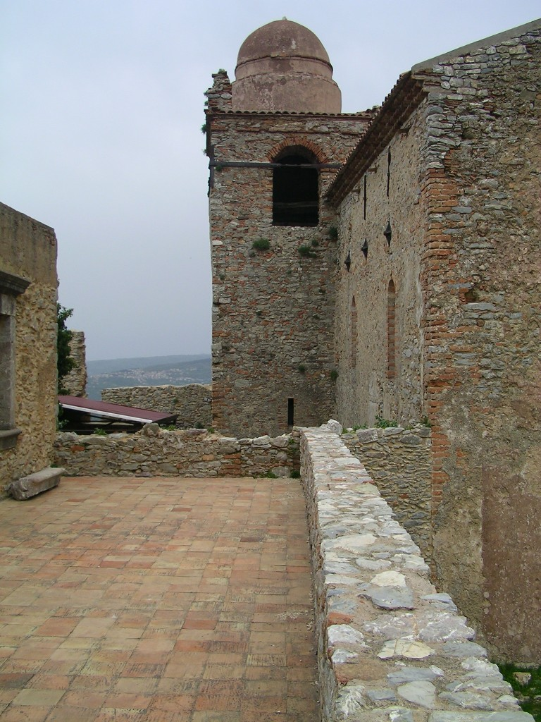 griechisches Kloster S.Filippo di Fragalà (Sizilien)